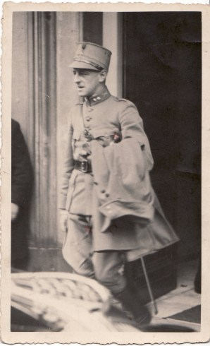 George Jambroes in Londen 1942